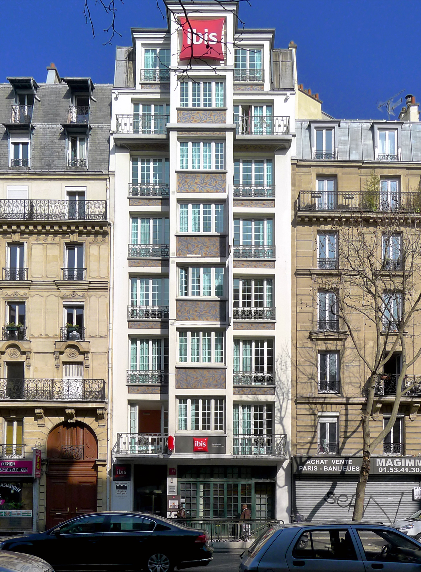 Boulevard Ornano (n° 70) - Paris XVIII